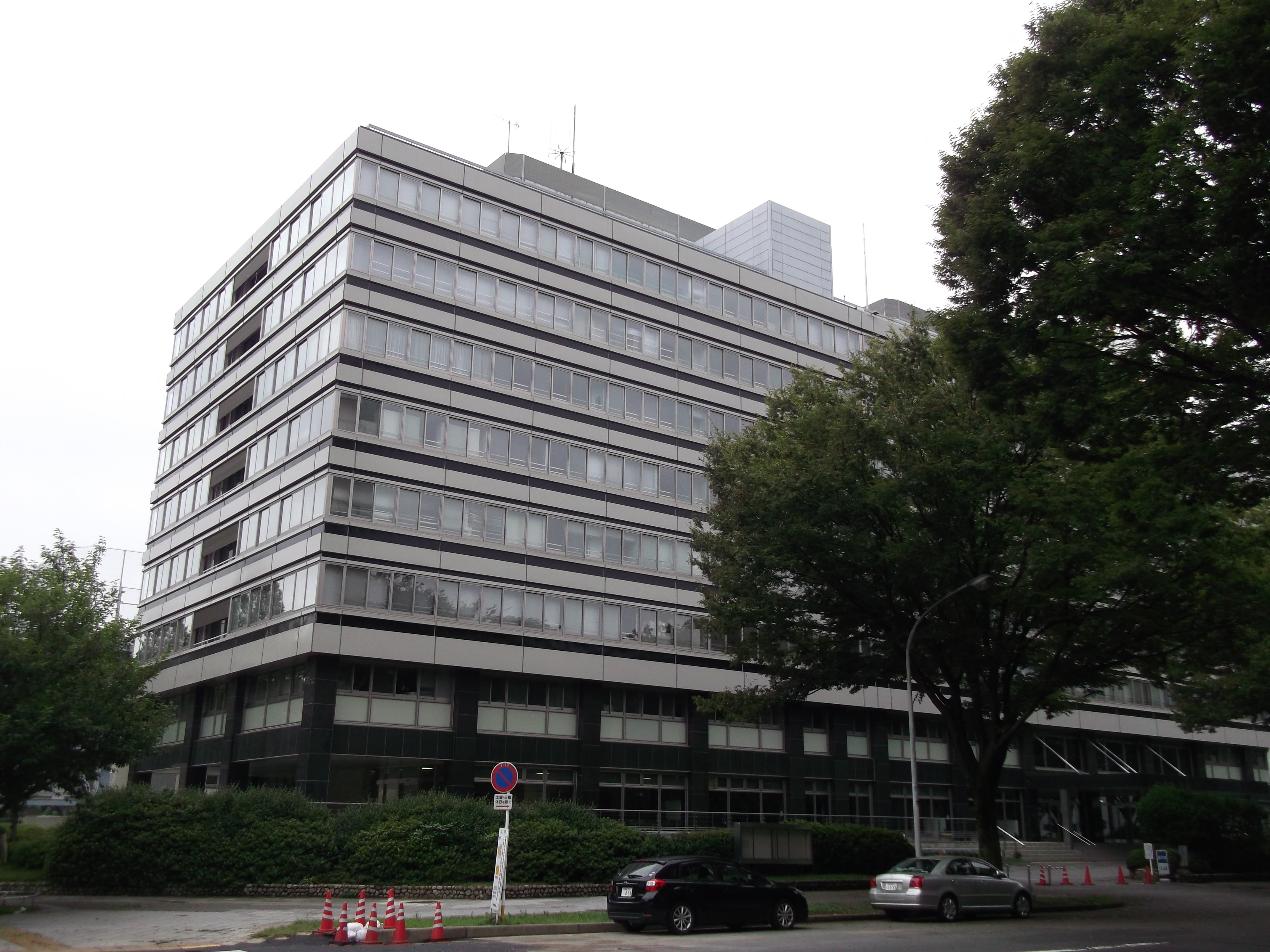 名古屋市中区の名古屋合同庁舎第2号館を北側公道東側より撮影（人事院事務総局中部事務局、公正取引委員会事務総局中部事務所、中部管区行政管理局、東海北陸厚生局麻薬取締部、愛知労働局、中央労働委員会事務局中部地方事務所、中部地方整備局、国土地理院中部地方測量部、製品評価技術基盤機構 認定センター中部認定事務所・中部支所）